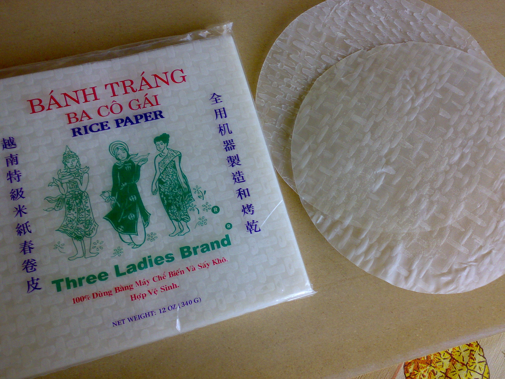 rice paper can come in squares or circles